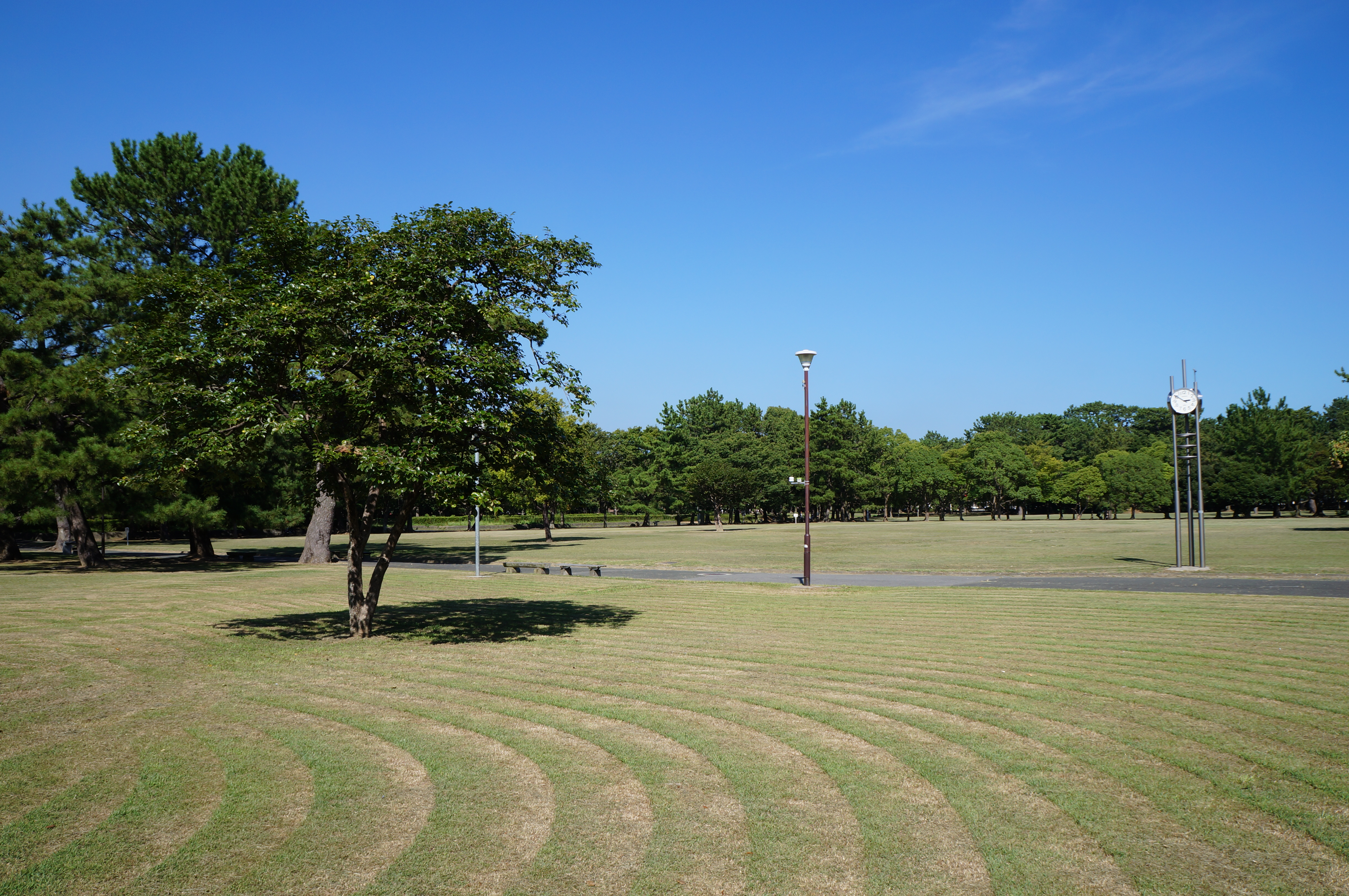 Takashi Ryokuchi in Toyohashi City, Aichi Prefecture, Japan.